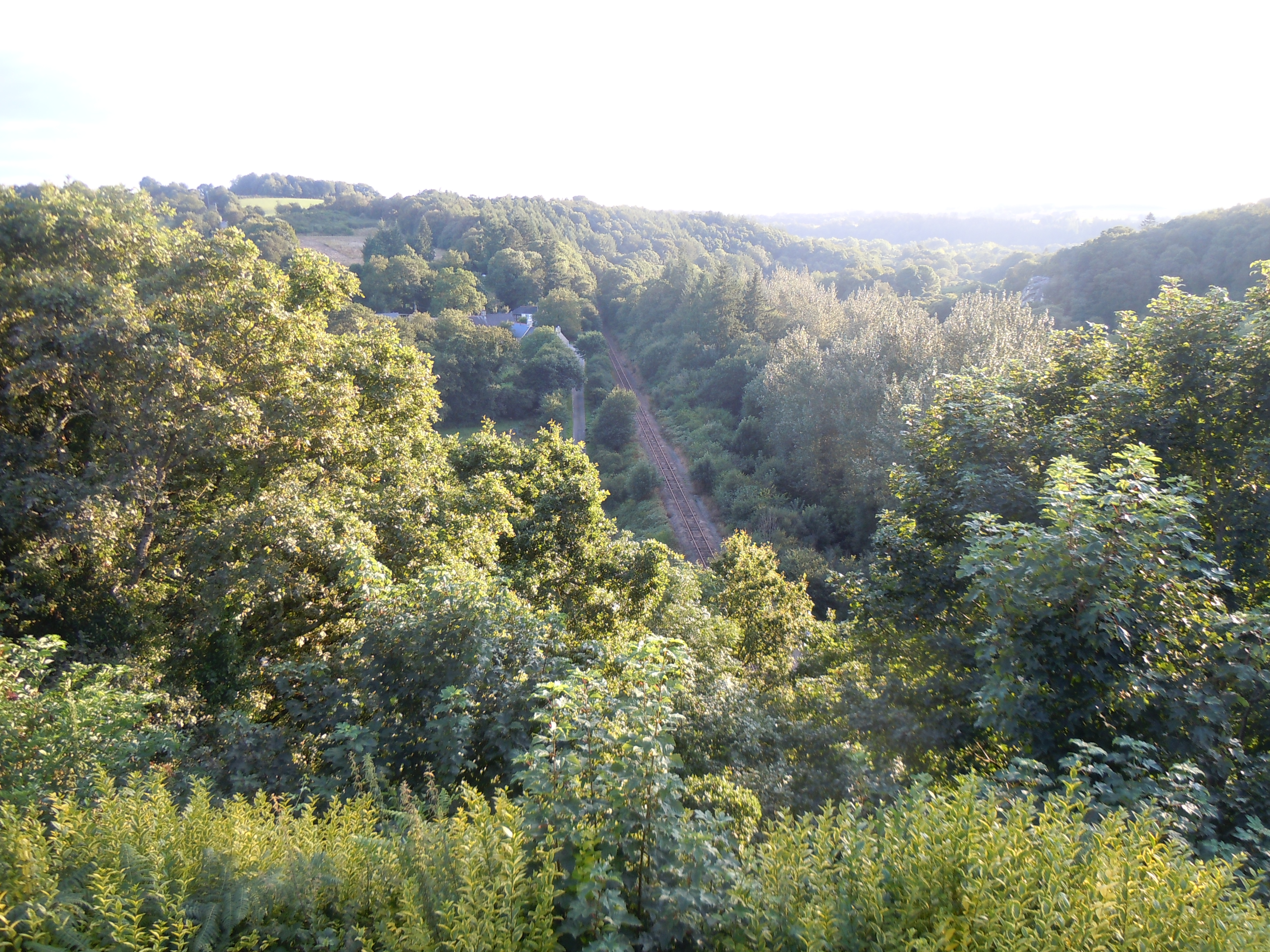 Passage de la ligne ferroviaire à voie unique Pontivy-Auray sous la butte de Castennec (Bieuzy, département du Morbihan)